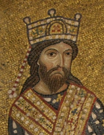 Roger II. war seit 1130 bis 1154 König von Sizilien. Der zweite Sohn Rogers I. aus dessen dritter Ehe mit Adelheid von Savona wurde nach dem Tod seines Bruders Simon im Jahre 1105 Graf von Sizilien.